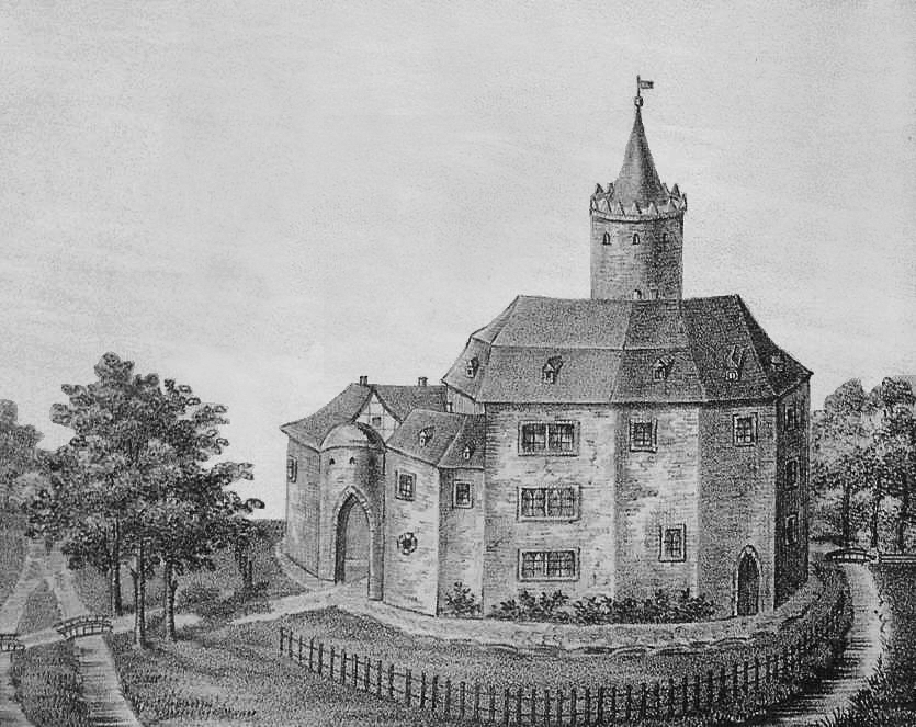 Burg Calvörde - Druck aus Görges